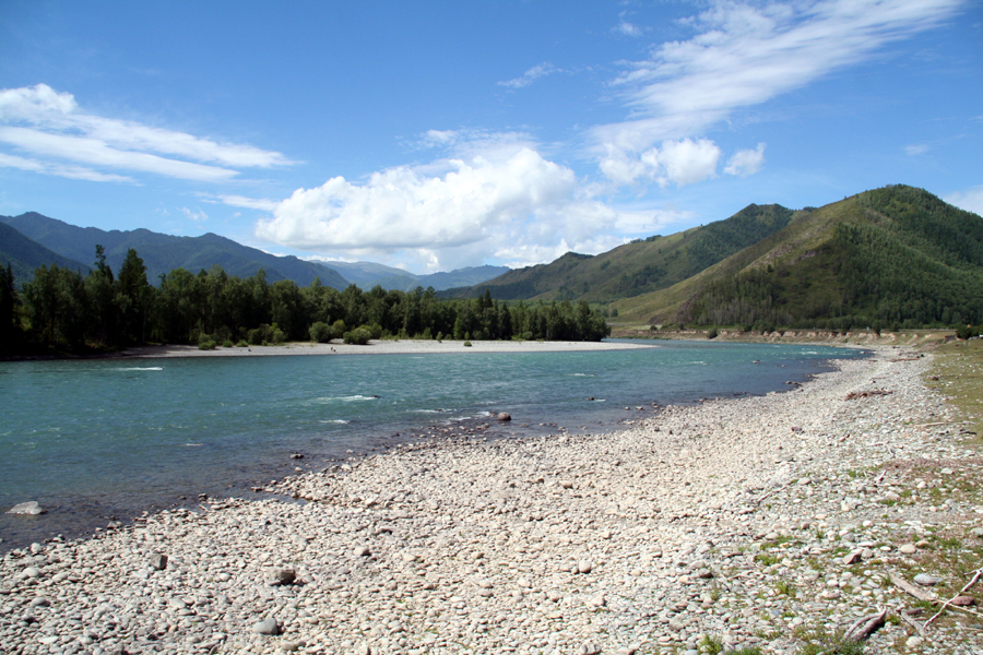 Altay mountains (river Katun), Photo by Vít Hněvkovský, 2006 Altaj (řeka Katuň)